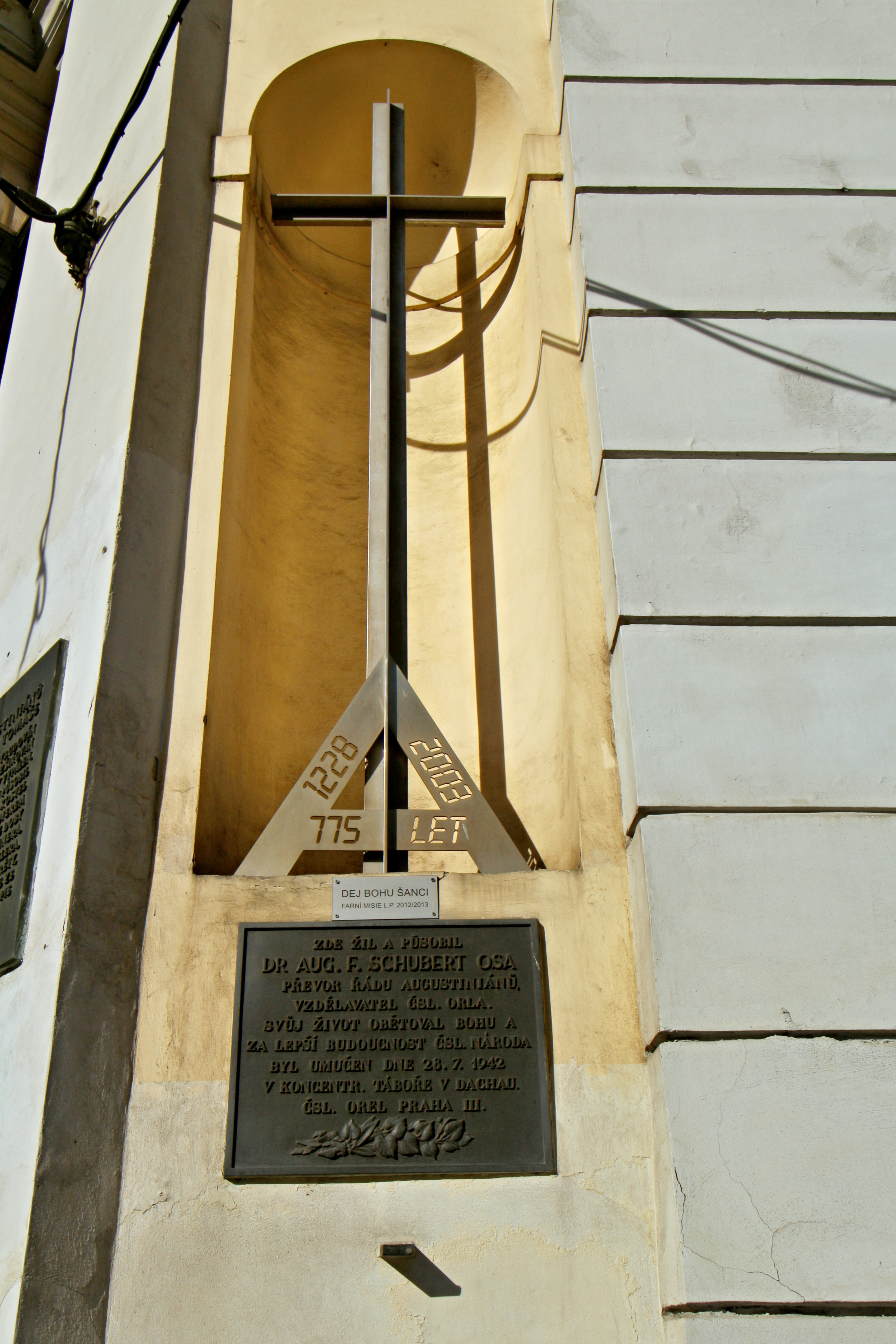 Malá Strana, pamětní kříž převora řádu augustiniánů, dr. Aug. F. Schuberta na kostele sv. Tomáše